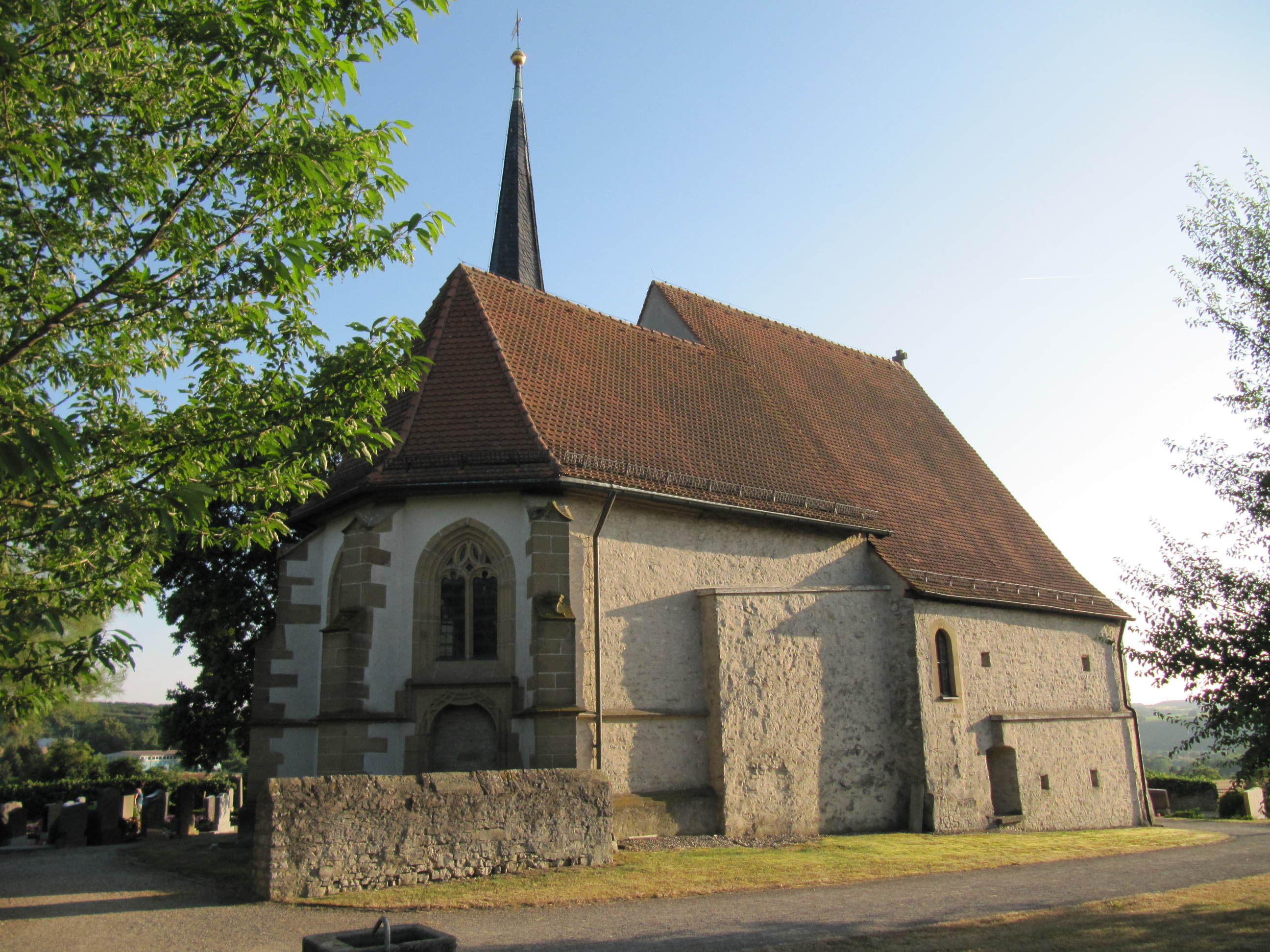 Bergkirche von Hohenfeld 1